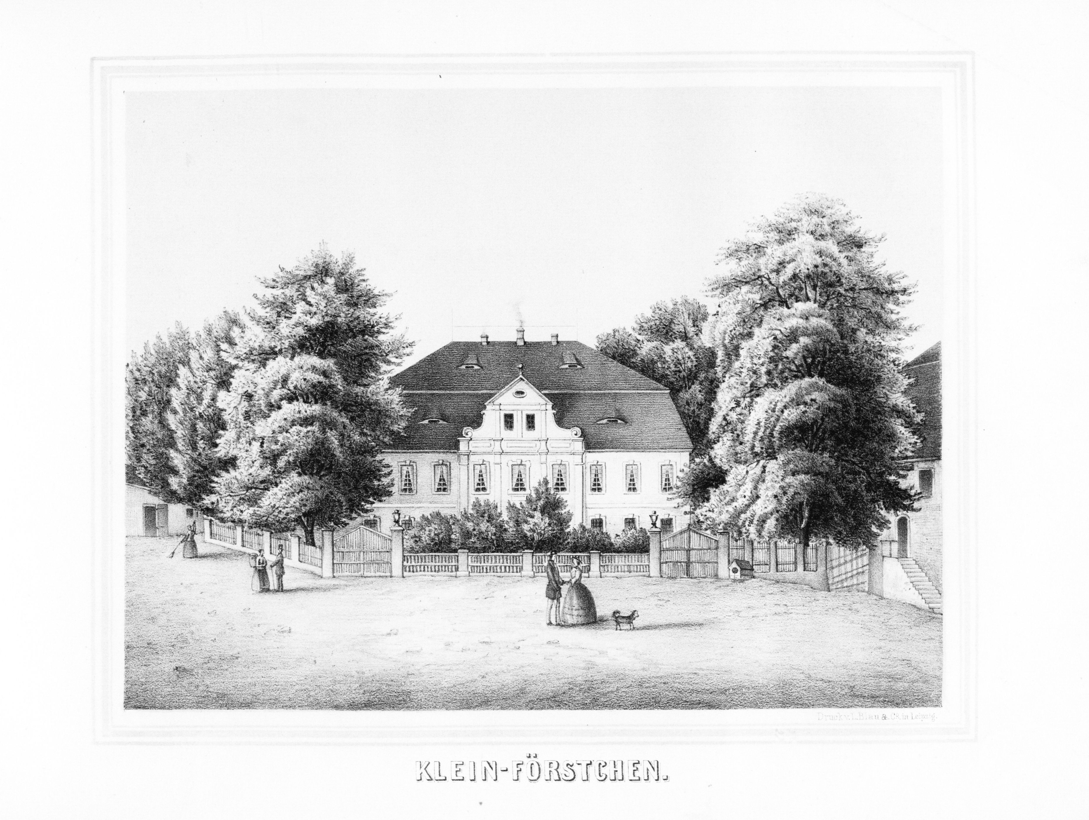 Klein - Förstchen aus: Album der Rittergüter und Schlösser im Königreiche Sachsen Markgrafenthum Oberlausitz Section: III